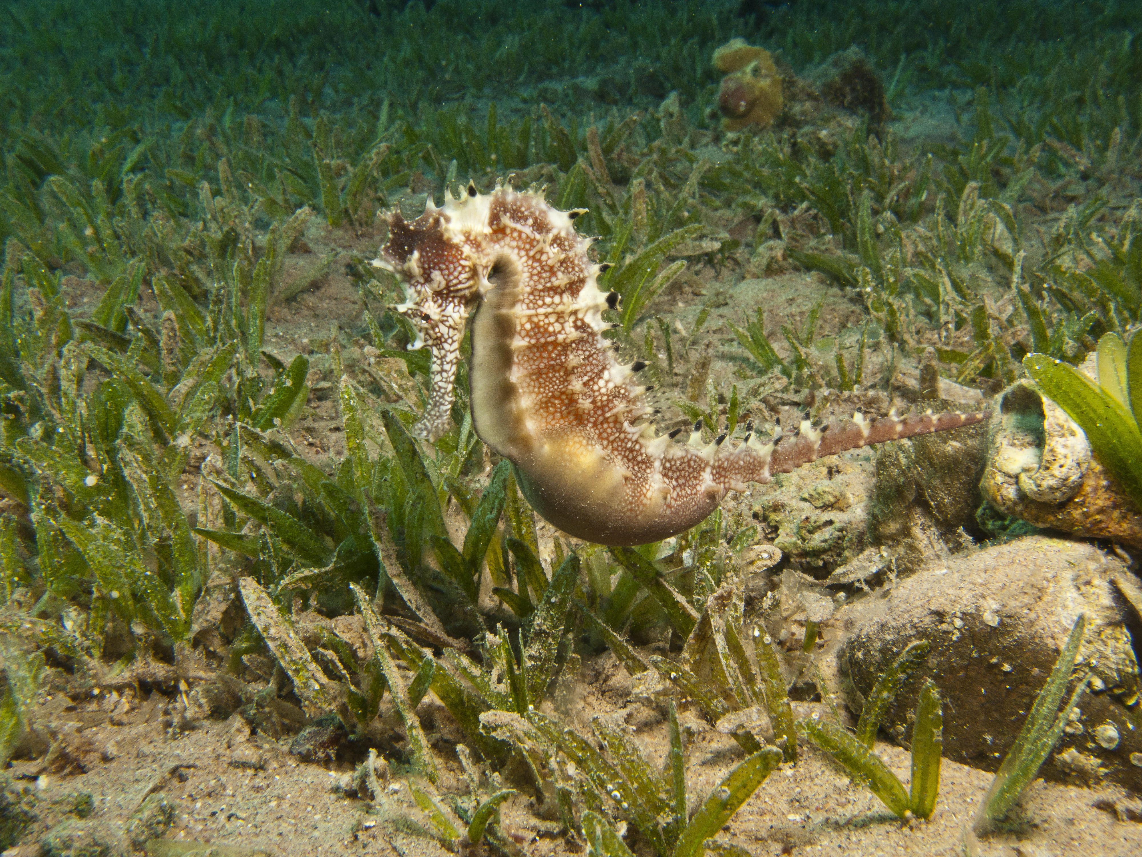 Hippocampus jayakari en Dhahab, Janub Sina', Egipto